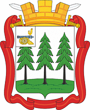 Герб города Ельня, Смоленская область, Россия